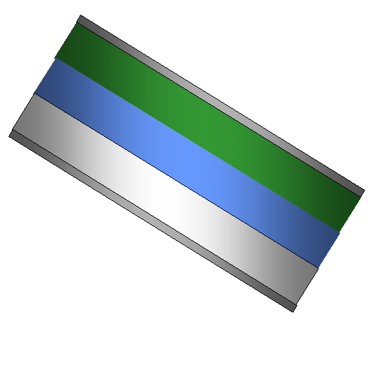 Seit dem 19. Jahrhundert sind die Farben der Kurländer an deutschen Universitäten "grün-blau-weiß". Grafik selbst erstellt, GNU-FDL.